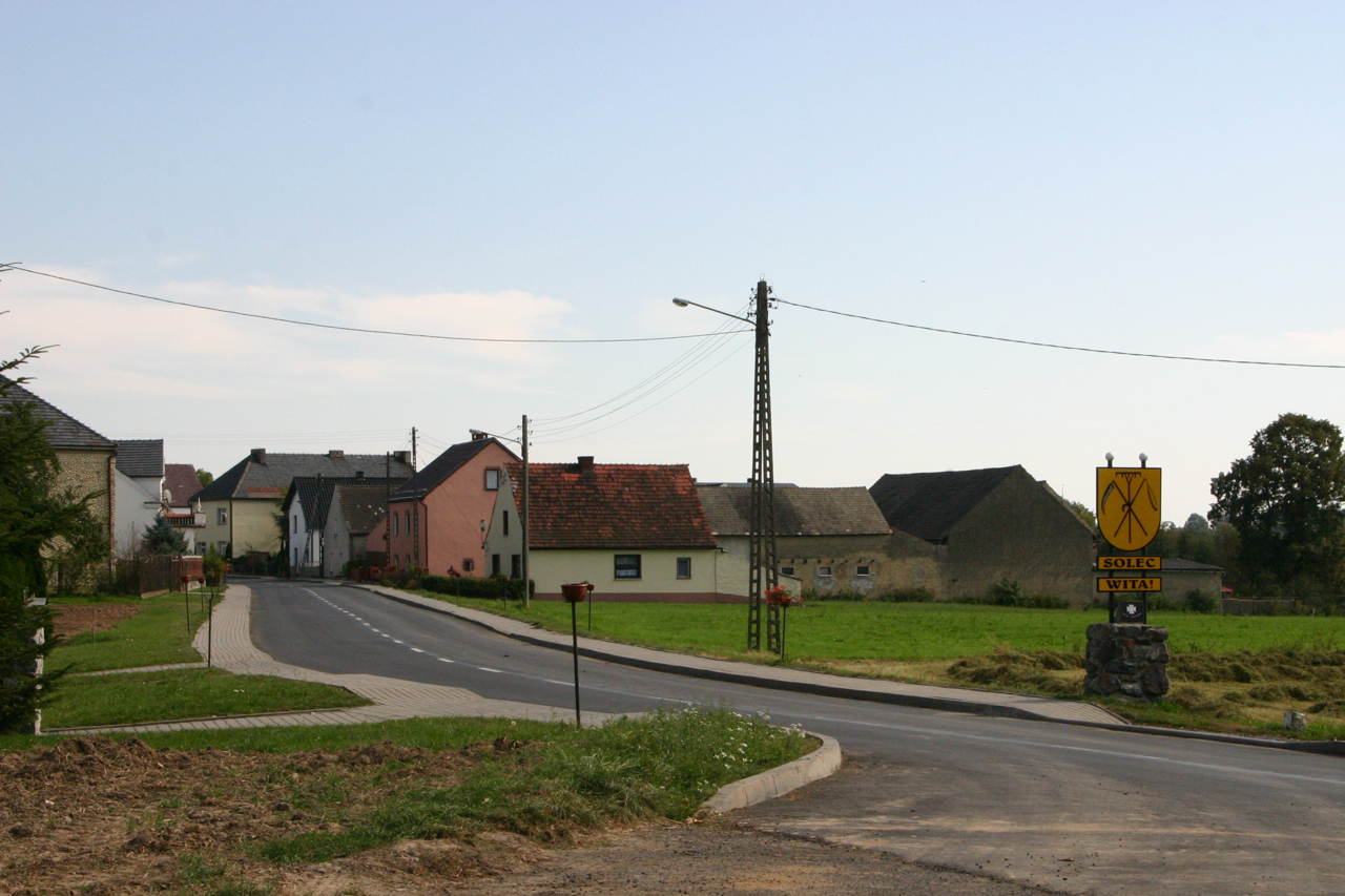 Solec (dodatkowa nazwa w j. niem. Altzülz) – wieś w Polsce położona w województwie opolskim, w powiecie prudnickim, w gminie Biała.